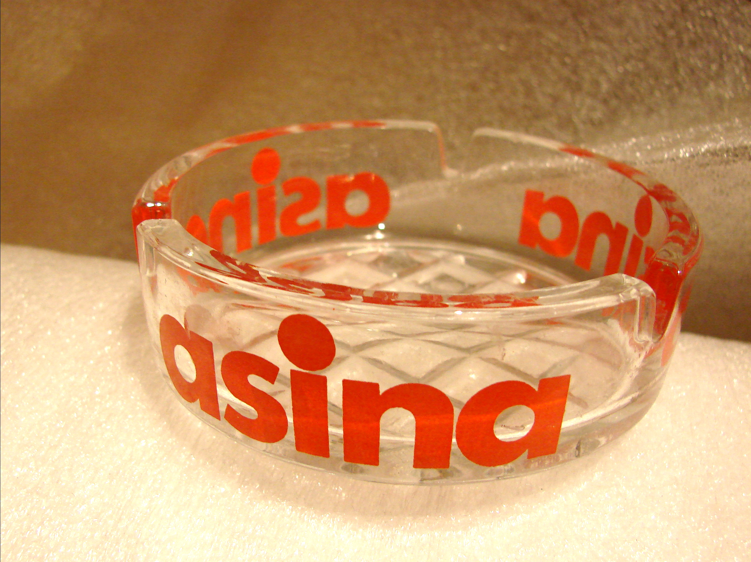 Asina, sodavand fra Norge